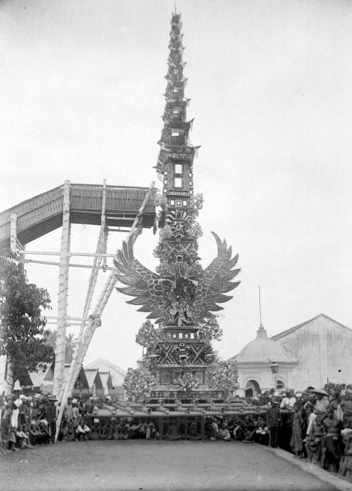 Negatief. Lijkentoren (wadah) van Goesti Djilantik in Karangasem, Bali